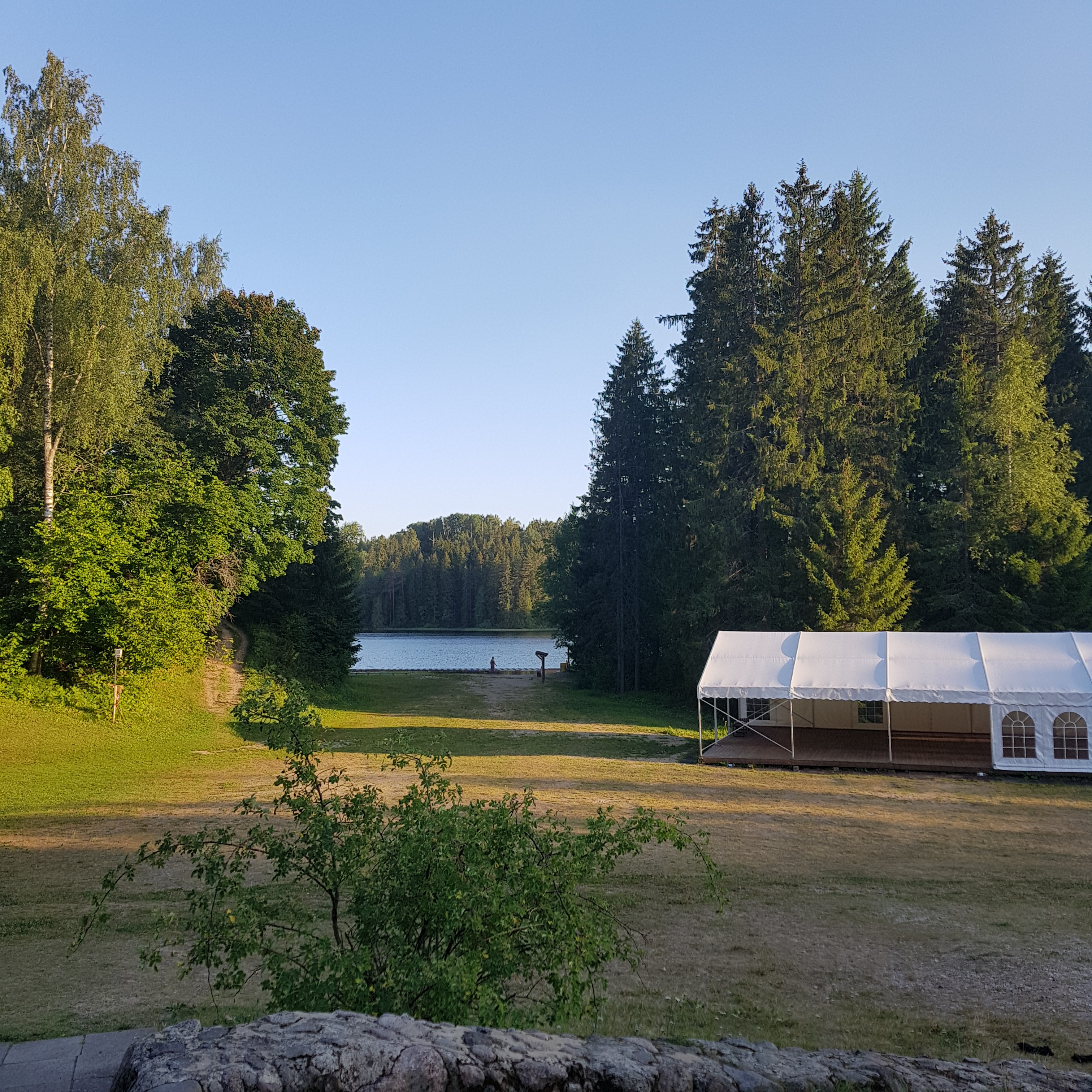 Pildil on avanemas vaade Väikjärvele.